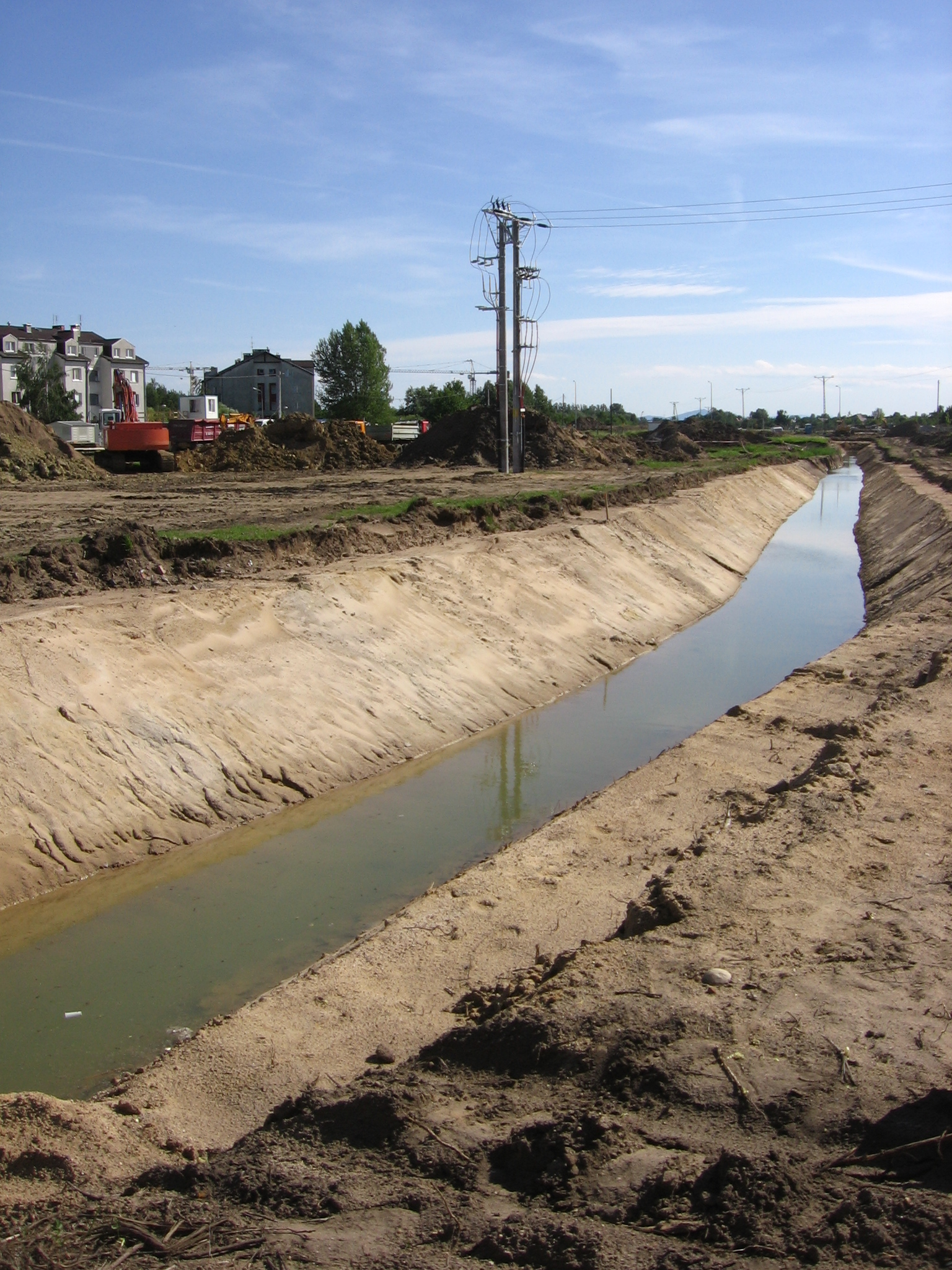 strumień Toczek we Wrocławiu (skanalizowany w związku z budową Autostradowej Obwodnicy Wrocławia) widziany z ul. Rędzińskiej w kierunku południowo-zachodnim, w stronę ul. Królewieckiej